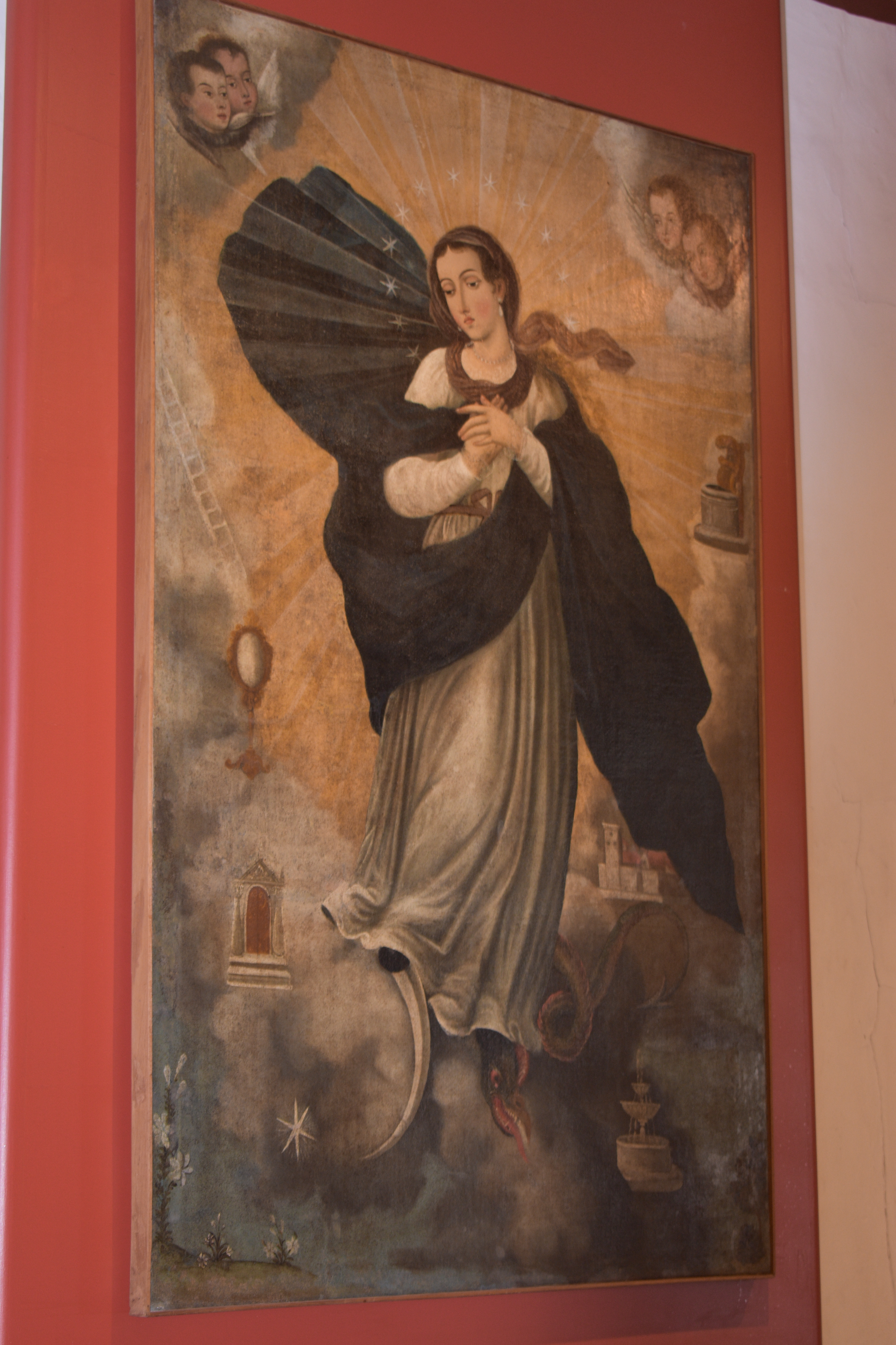 Restaurada por el Instituto de Patrimonio Cultural en 1991. Dimensiones: 137cms x 88